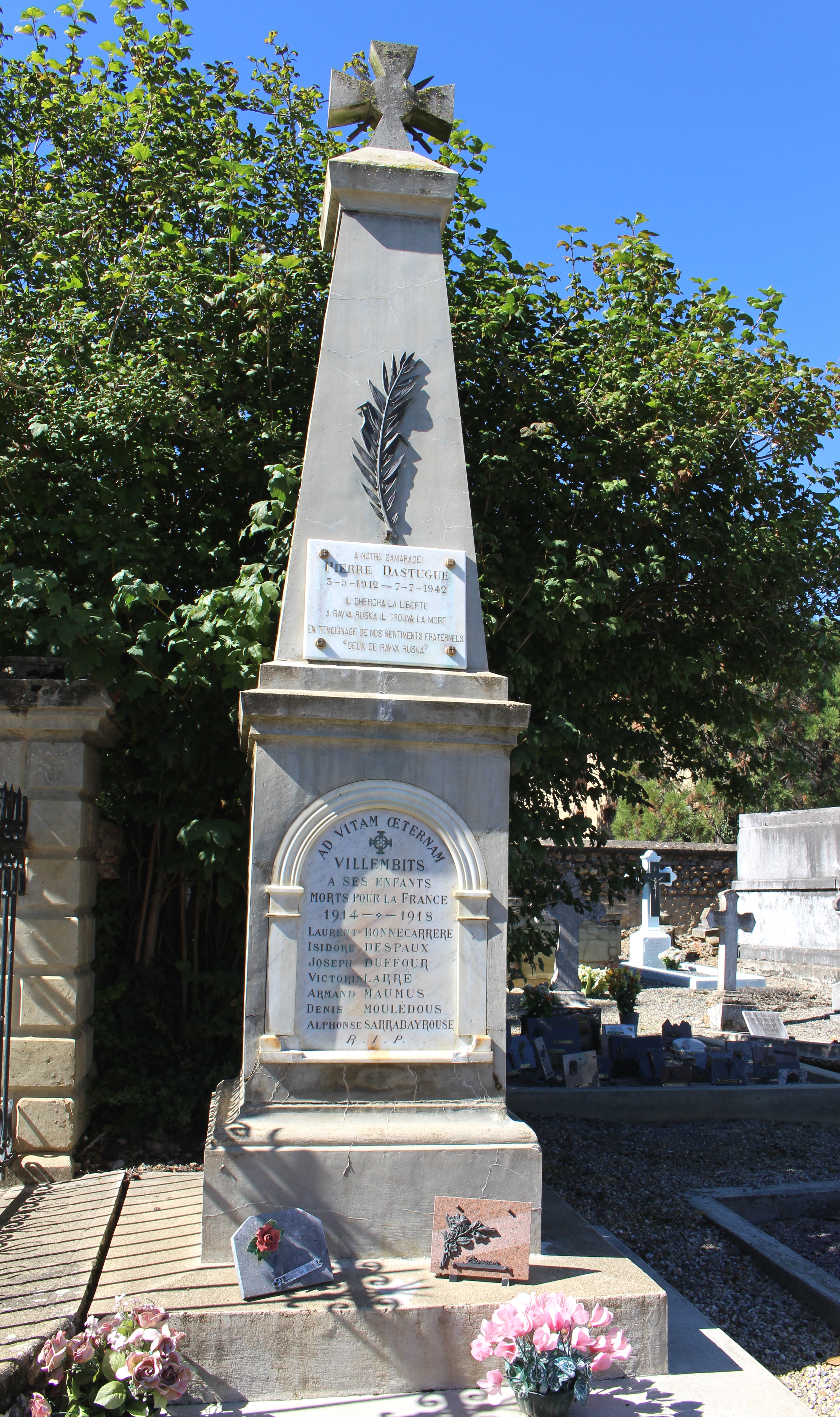 Monument aux morts de Villembits (Hautes-Pyrénées)